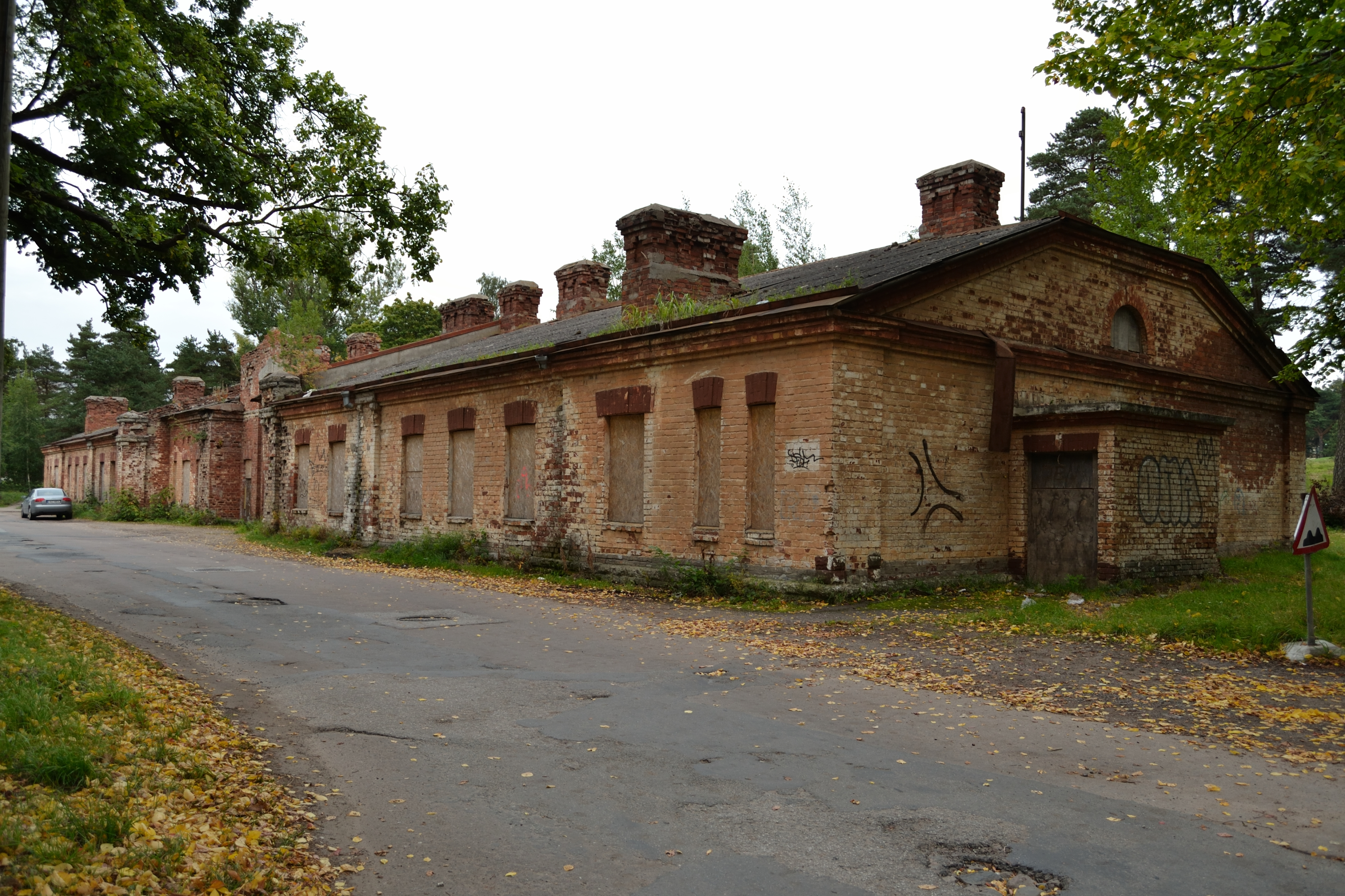 Tondi sõjaväelinnaku sauna- ja vahtkonnahoone Tammsaare tee 56, 58, 1915-1916